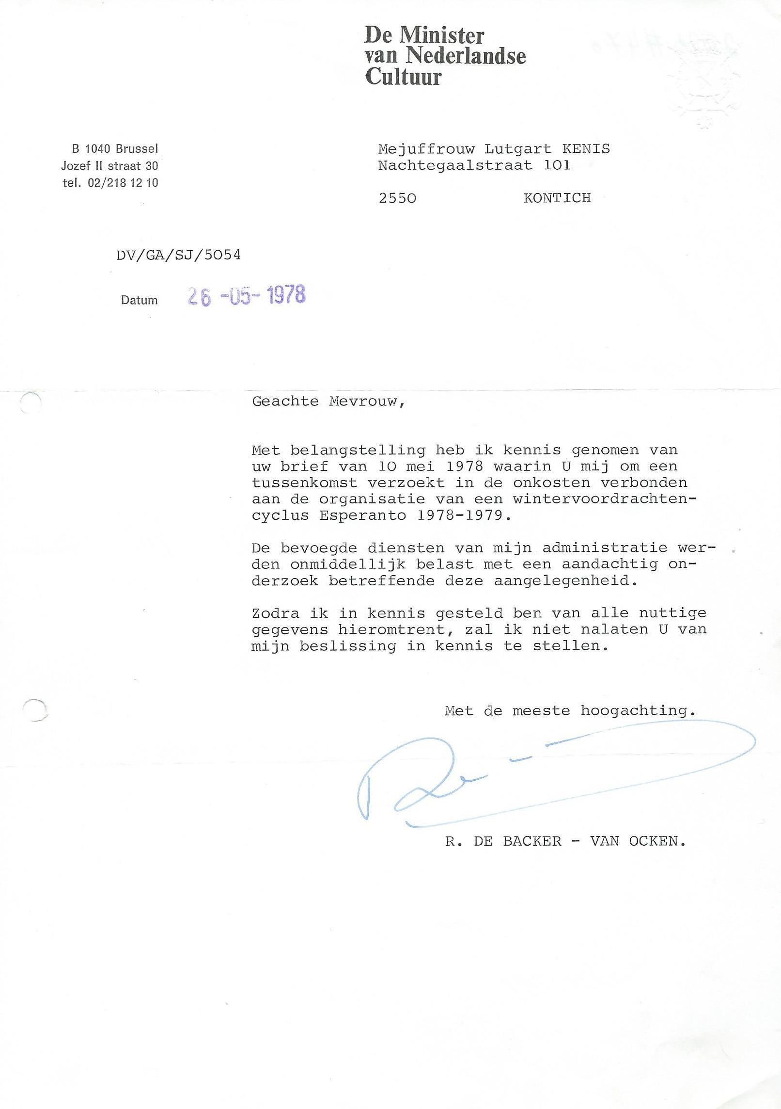 Letero de Rika De Backer